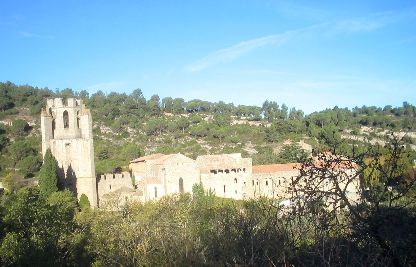 Abbaye Sainte-Marie de Lagrasse